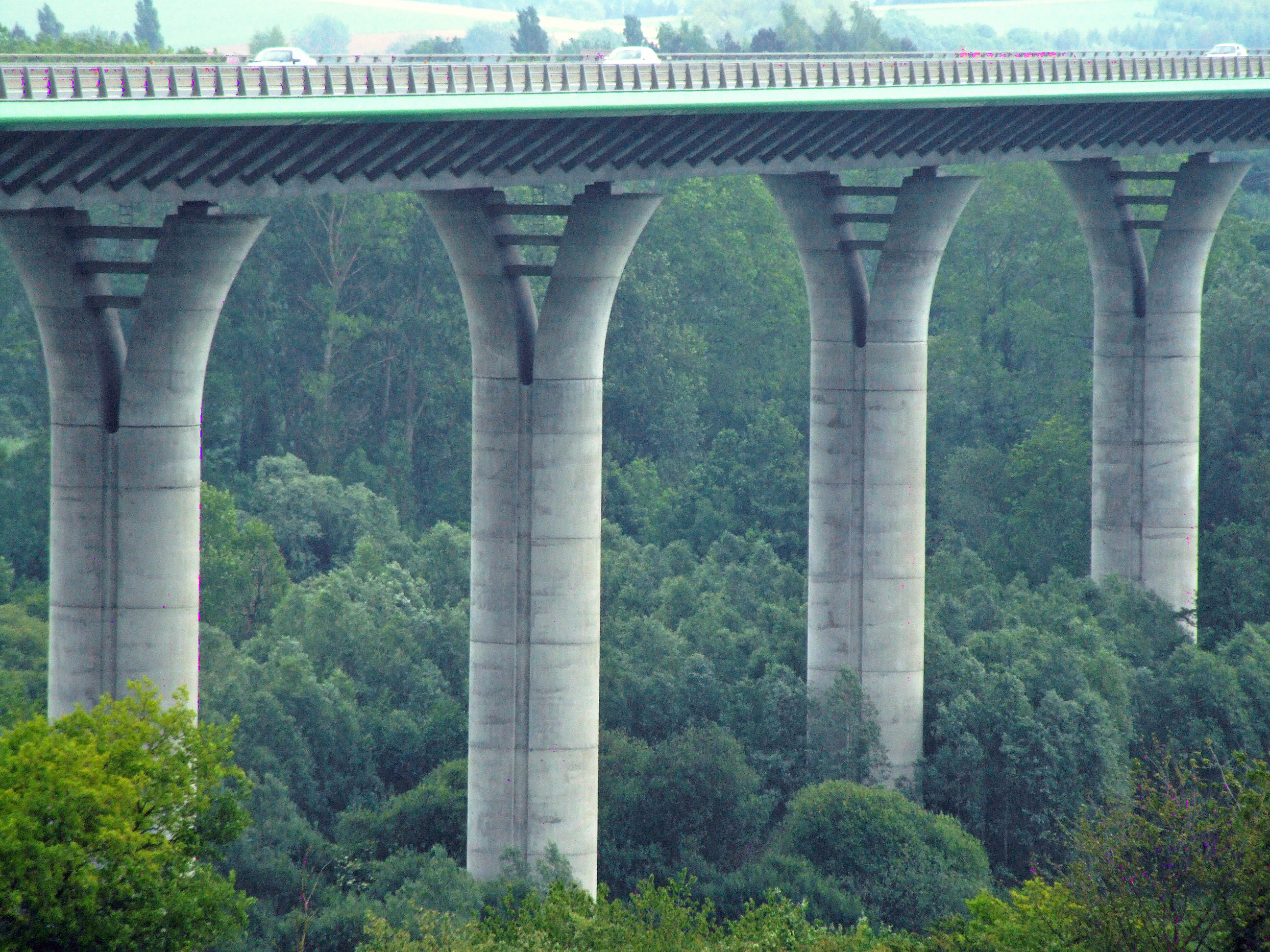 A16 - Viaduc du Scardon, à proximité d'Abbeville, Somme, Fr.